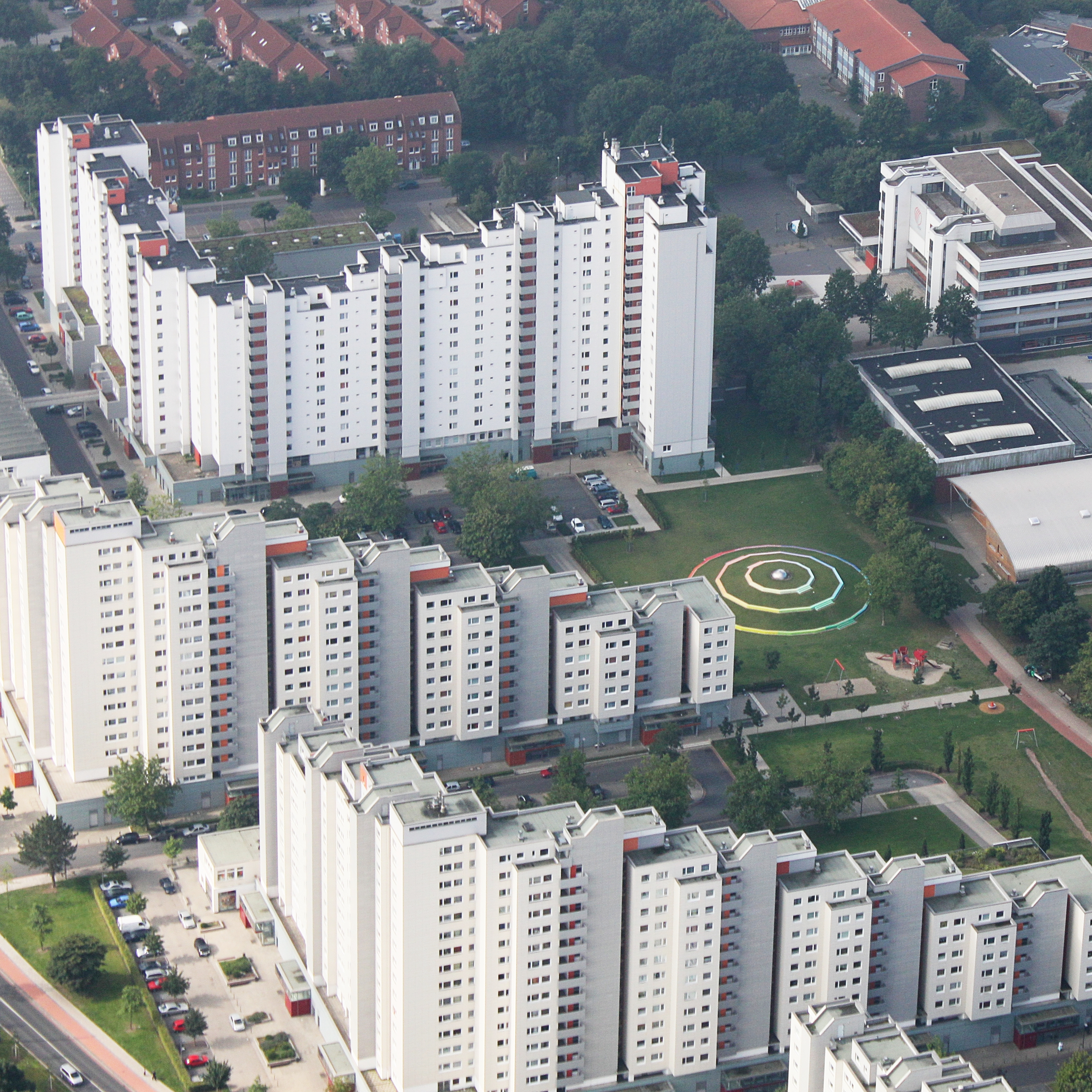 Luftaufnahme Bremen; entlang der A1 (auf der Südseite) vom Bremer Kreuz bis zum Weserpark